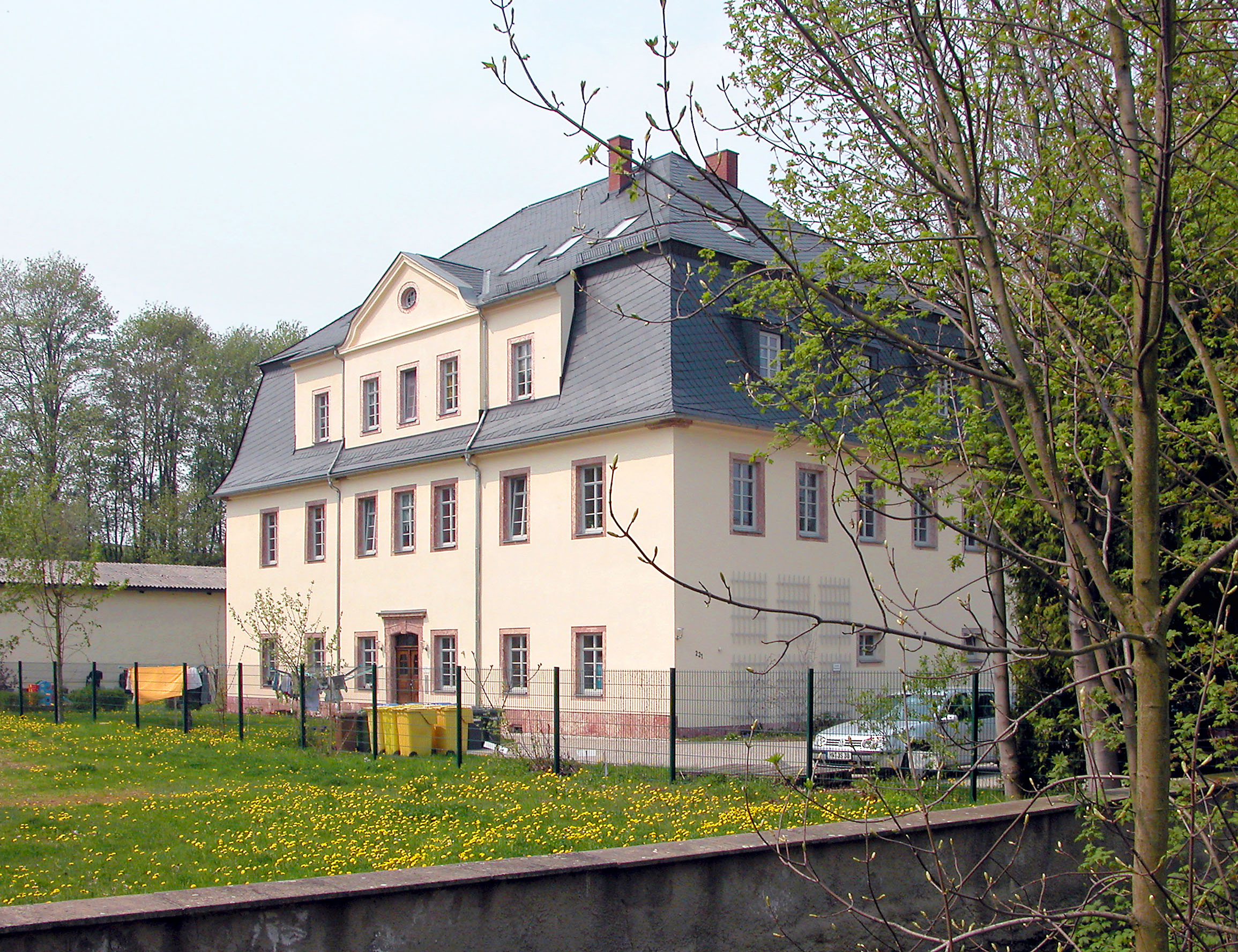 06.05.2006 09244 Auerswalde (Lichtenau) Auerswalder Hauptstraße 221 (GMP: 50.901328,12.911390): Das heutige Herrenhaus ließ Friedrich August Graf Vitzthum von Eckstädt im Jahr 1800 errichten. In der DDR Mehrfamilienhaus, Kindergarten und Bibliothek. 2001 privatisiert und anschließend saniert. [DSCN9837.TIF]20060506015.JPG(c)Blobelt